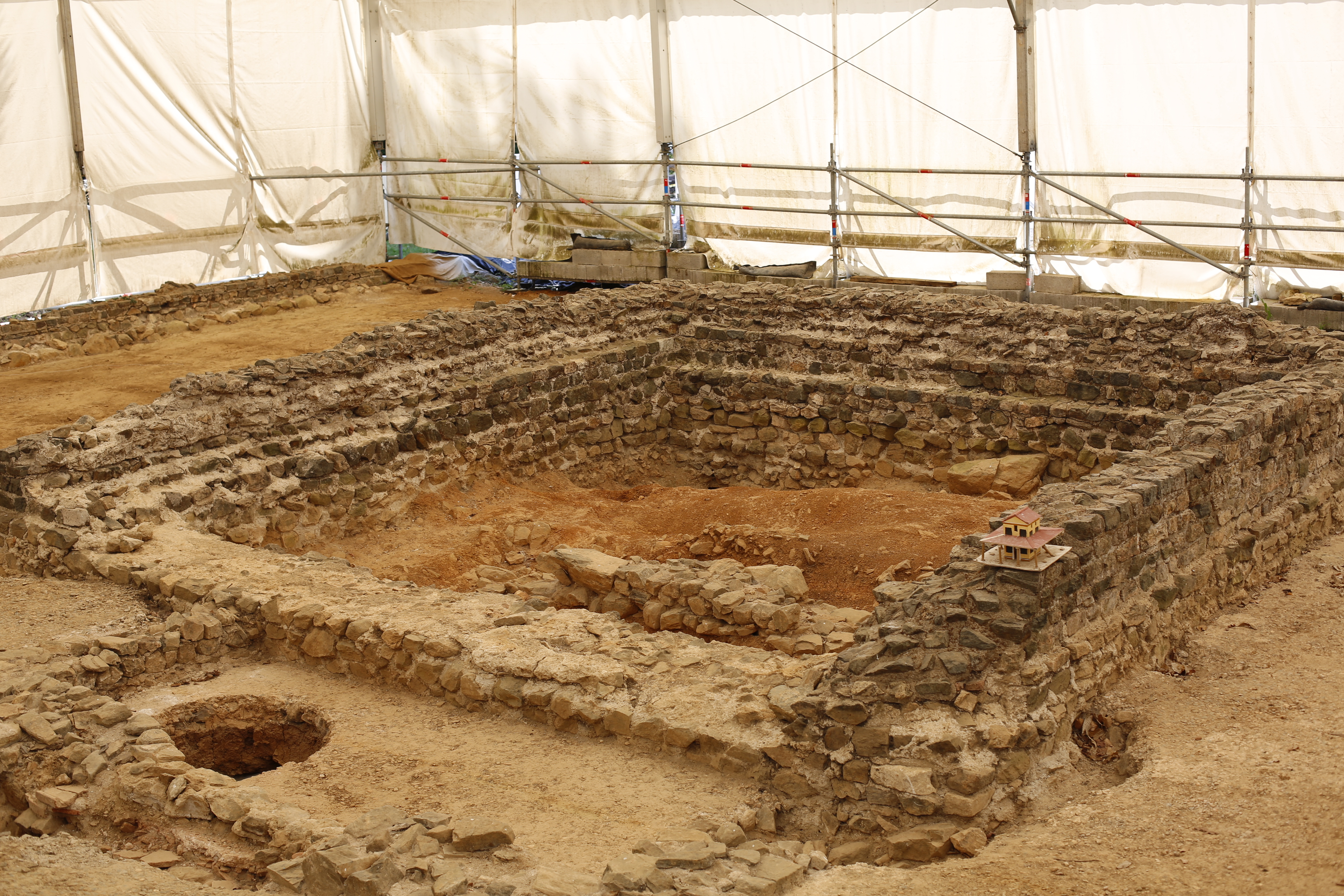 Site archéologique de Tintignac : sanctuaire gallo-romain. .